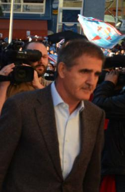 Paco Herrera cando era entrenador do Celta de Vigo no partido Celta-Dépor do 27 de outubro do 2012.